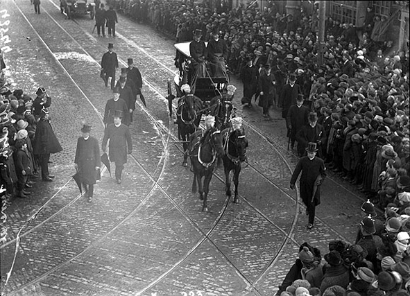 NLI Ref.: Ke 223